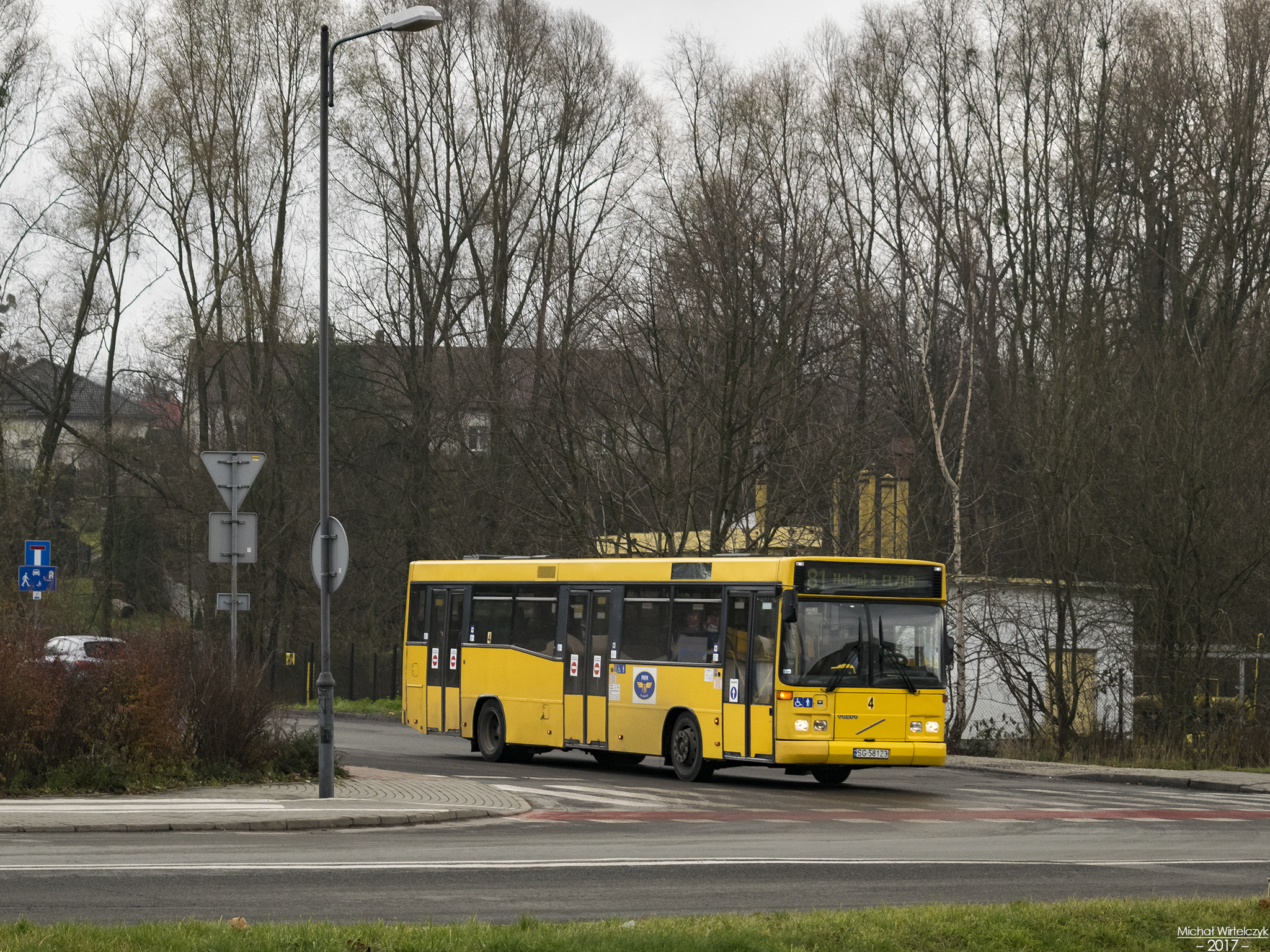 Zabrze - Rokitnica, ul. Żniwiarzy. Volvo B10BLE należące do Przedsiębiorstwa Komunikacji Miejskiej w Gliwicach podczas obsługi linii 81 relacji Zabrze Goethego - Zabrze Helenka Elzab.